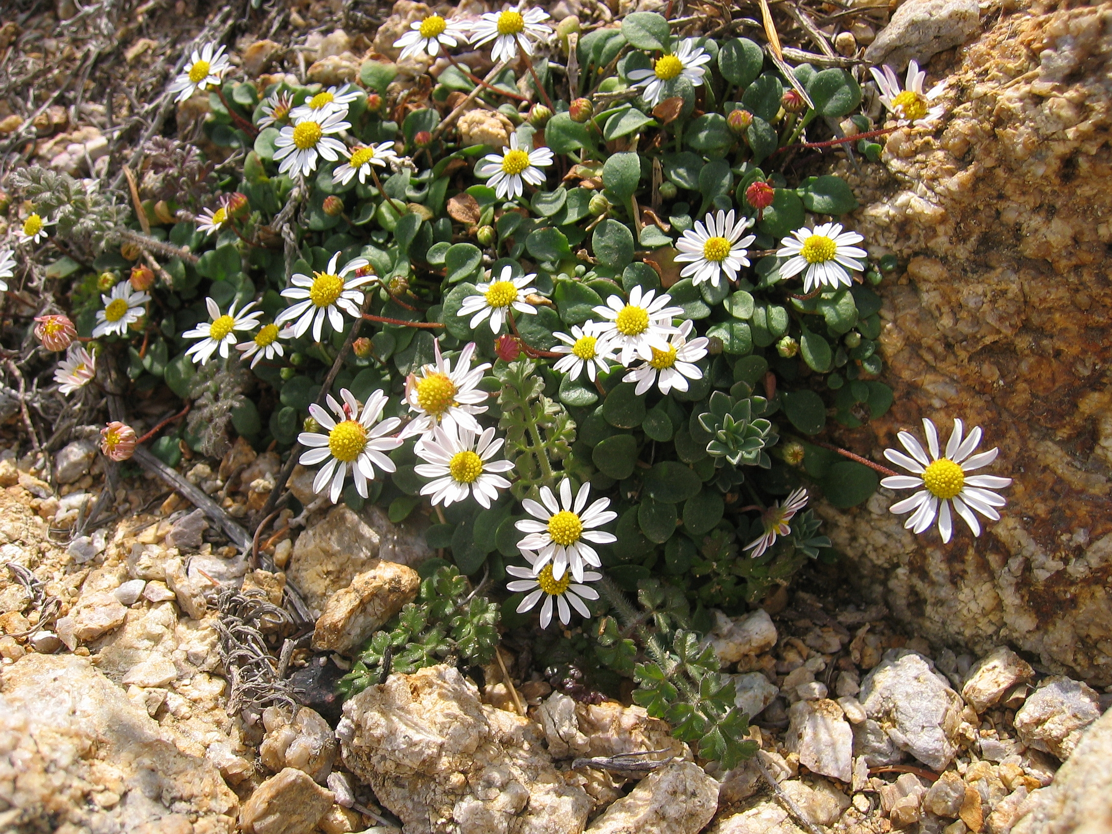 Bellium_bellidioides La Revellata, Corse, France